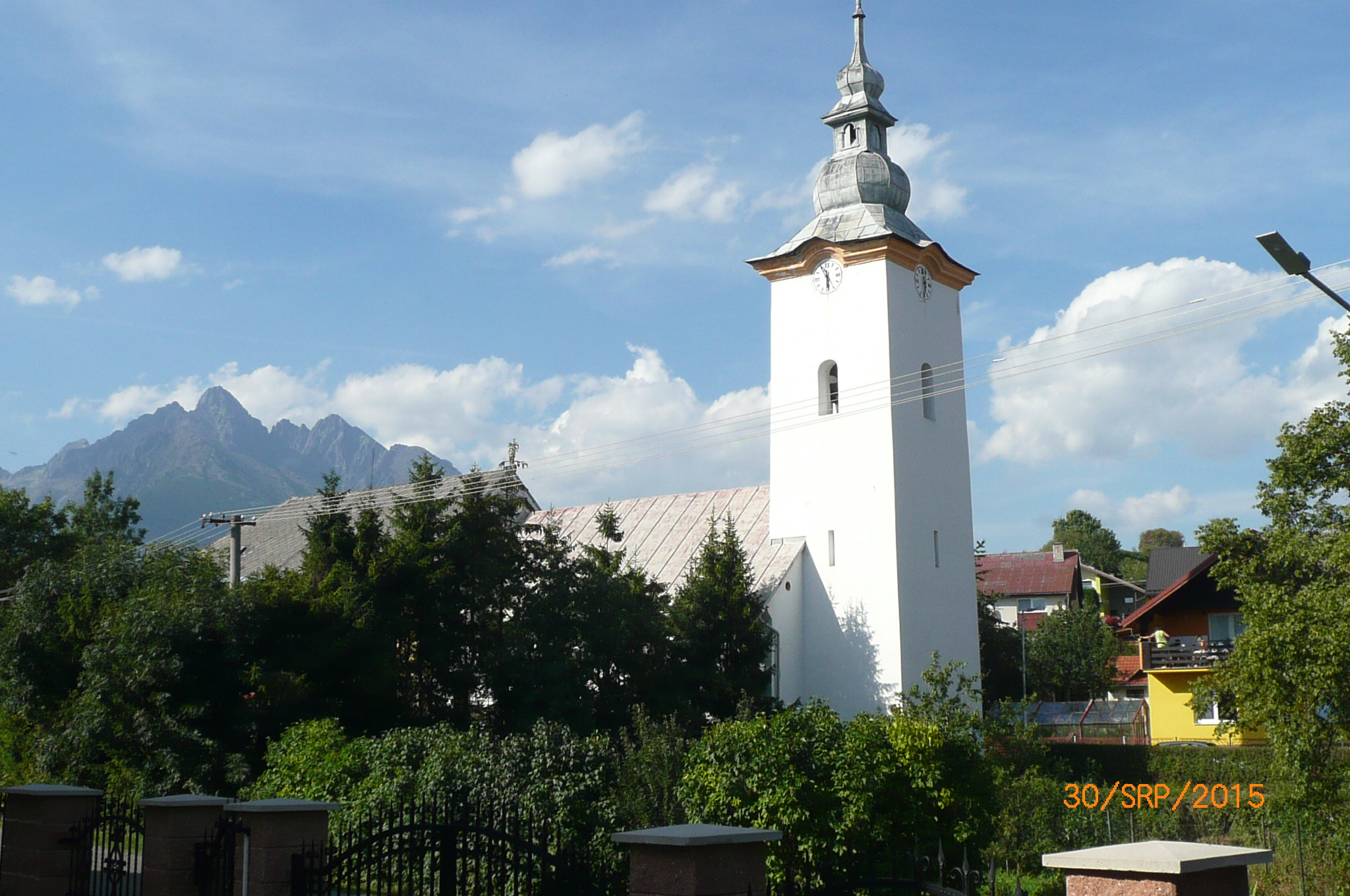 Nová Lesná, Slovakia